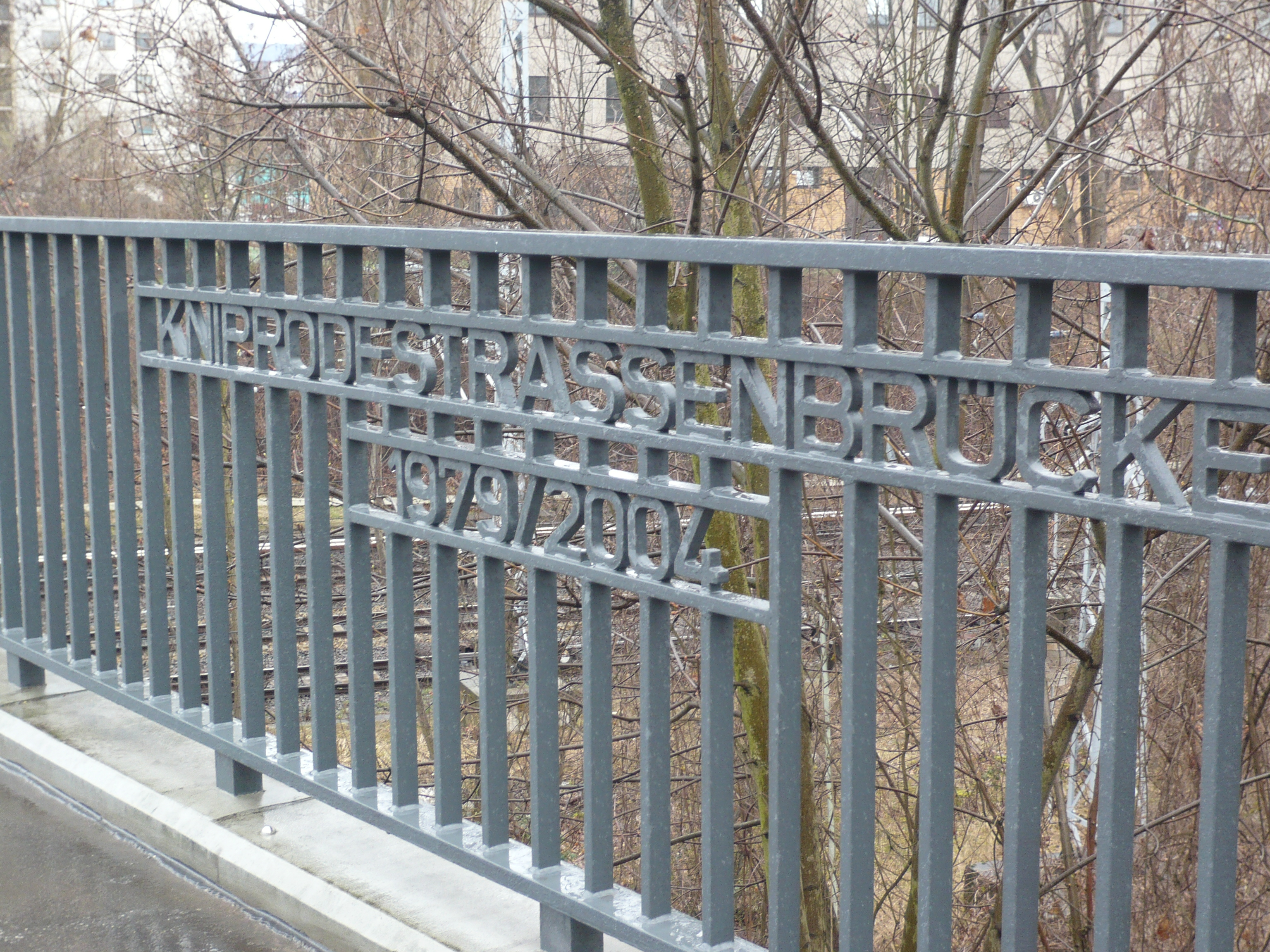 Kniprodestraßenbrücke, Bau- und Sanierungsjahre